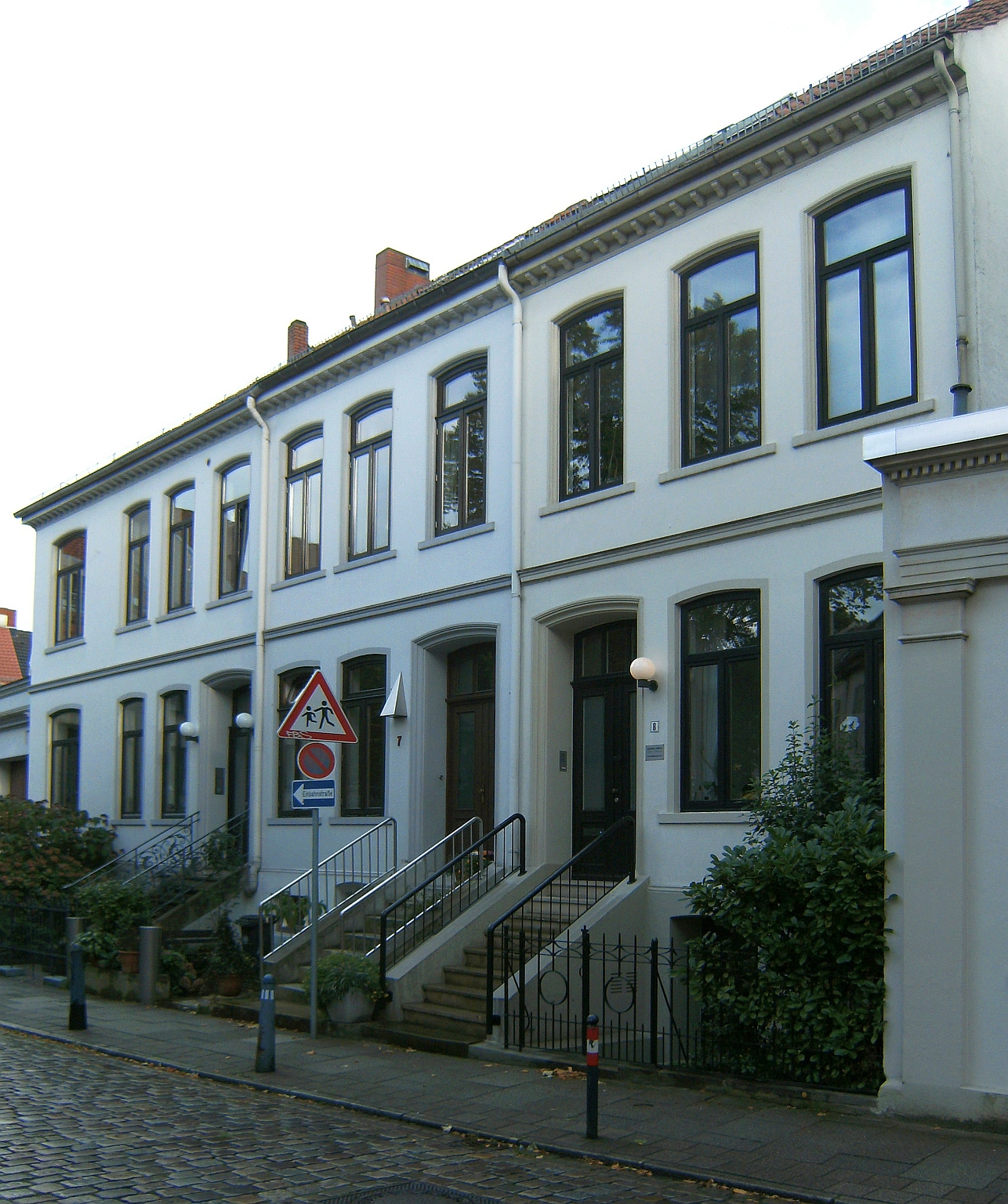 Ensemble Hoppenbank in Bremen, Hoppenbank 6. Die Denkmalgruppe ist ein geschütztes Kulturdenkmal in der Freien Hansestadt Bremen, mit der Nr. 1409 beim Landesamt für Denkmalpflege registriert.